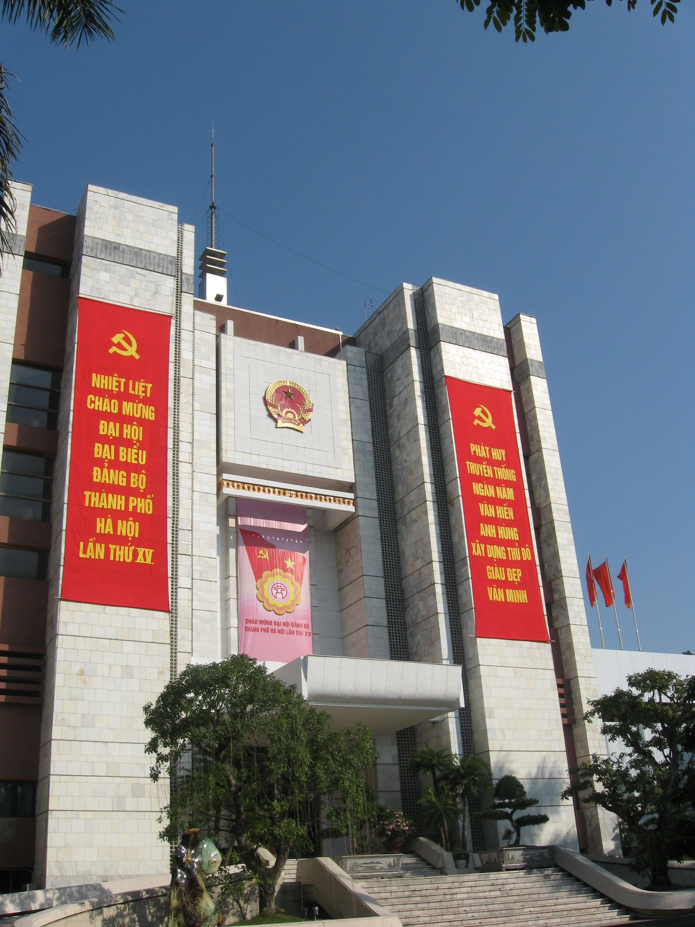 Hanoi City Hall